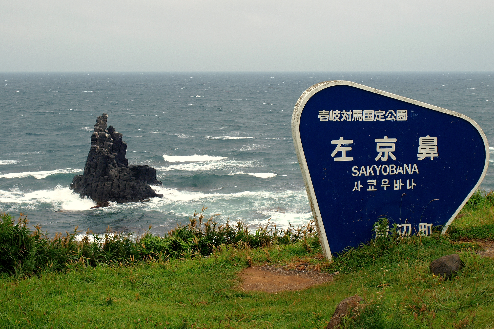 長崎県壱岐市の左京鼻。2009年8月4日撮影。